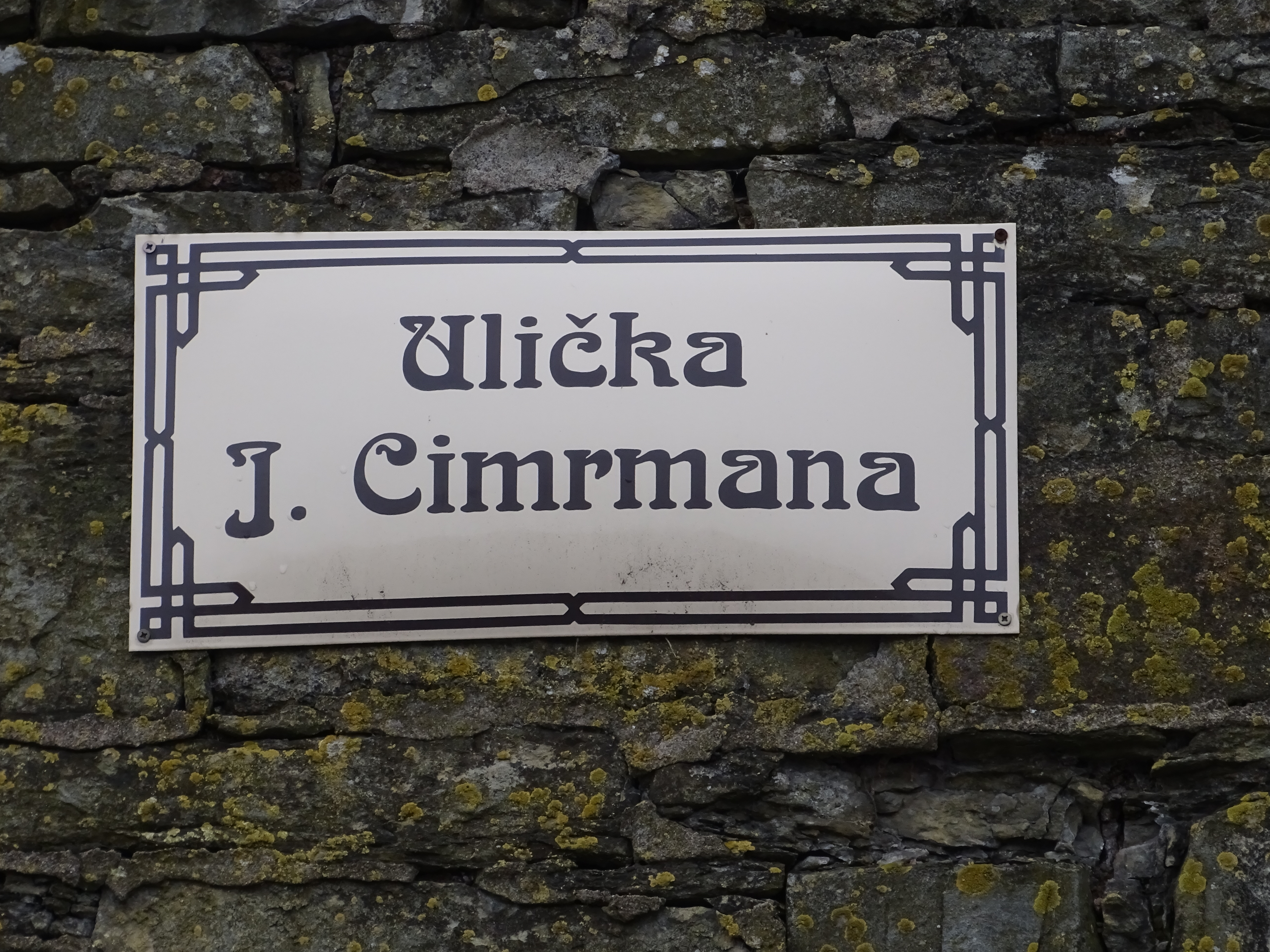 ulička